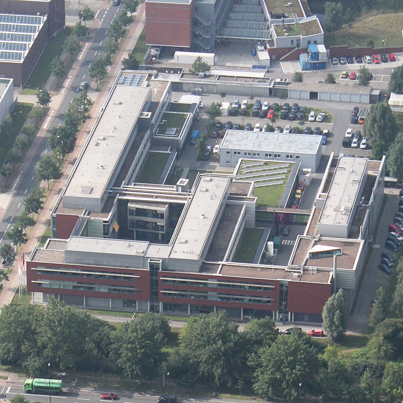 Luftaufnahme Bremen; entlang der A27; Fraunhofer-Institut für Fertigungstechnik und Angewandte Materialforschung (IFAM), Wiener Straße 12; Flughöhe 500 m